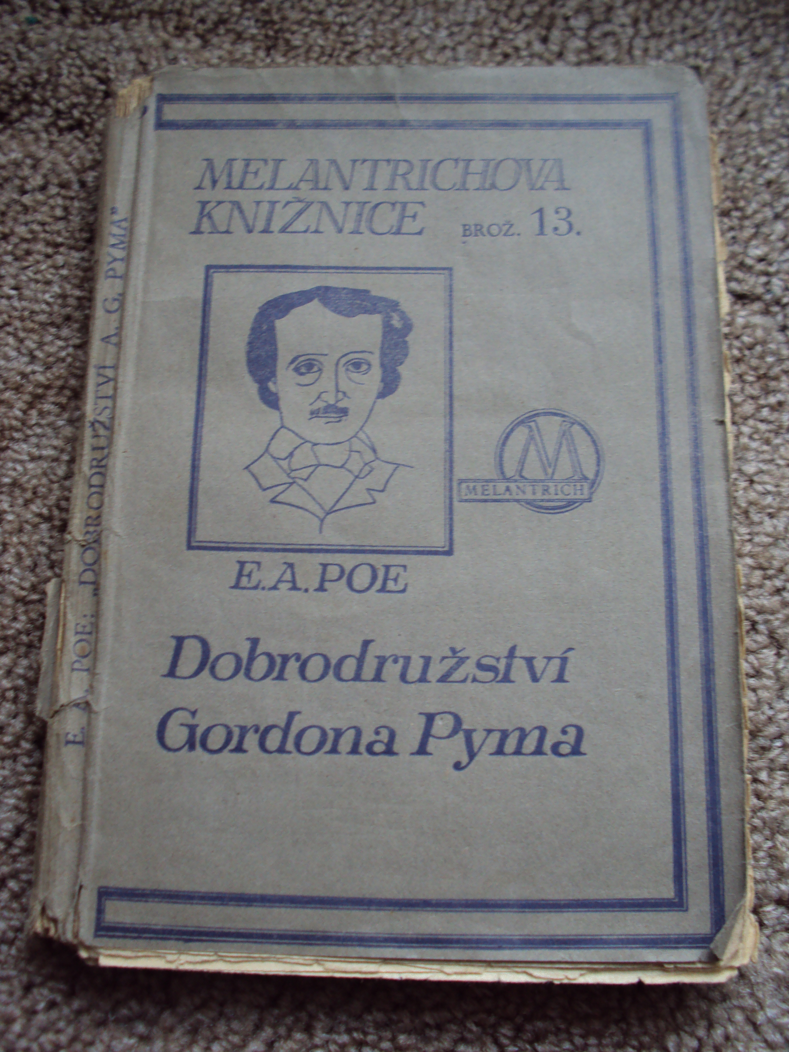 Ttl strana brožuty vydaná roku 1929 v Melantrichu